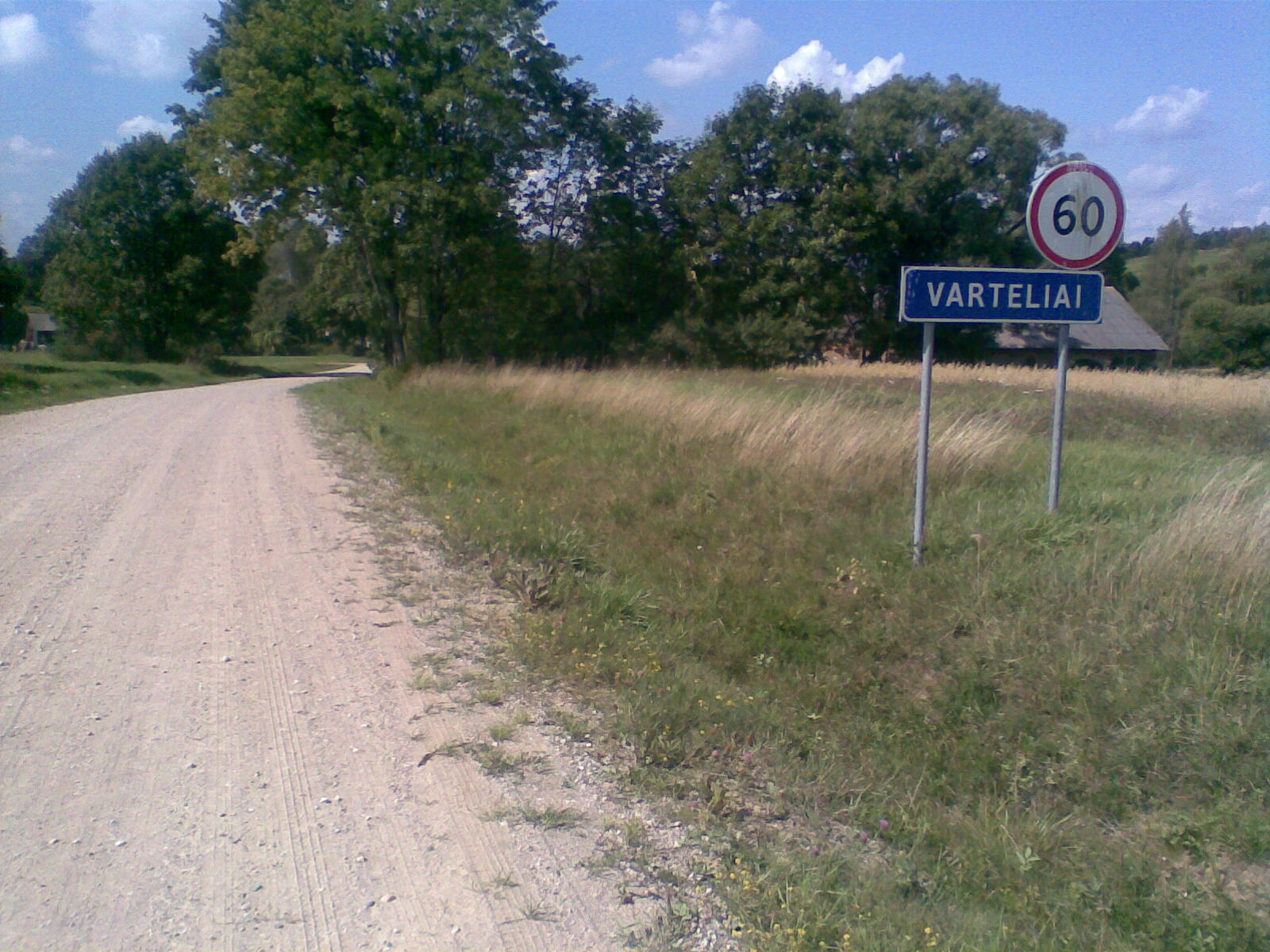 Entering Varteliai from PL border